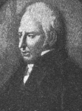 Appartenente al ramo napoletano della famiglia principesca dei Medici di Ottaviano, Luigi de' Medici è stato un giurista e uomo politico che visse e operò in alcuni fra i più convulsi periodi del Regno di Napoli.